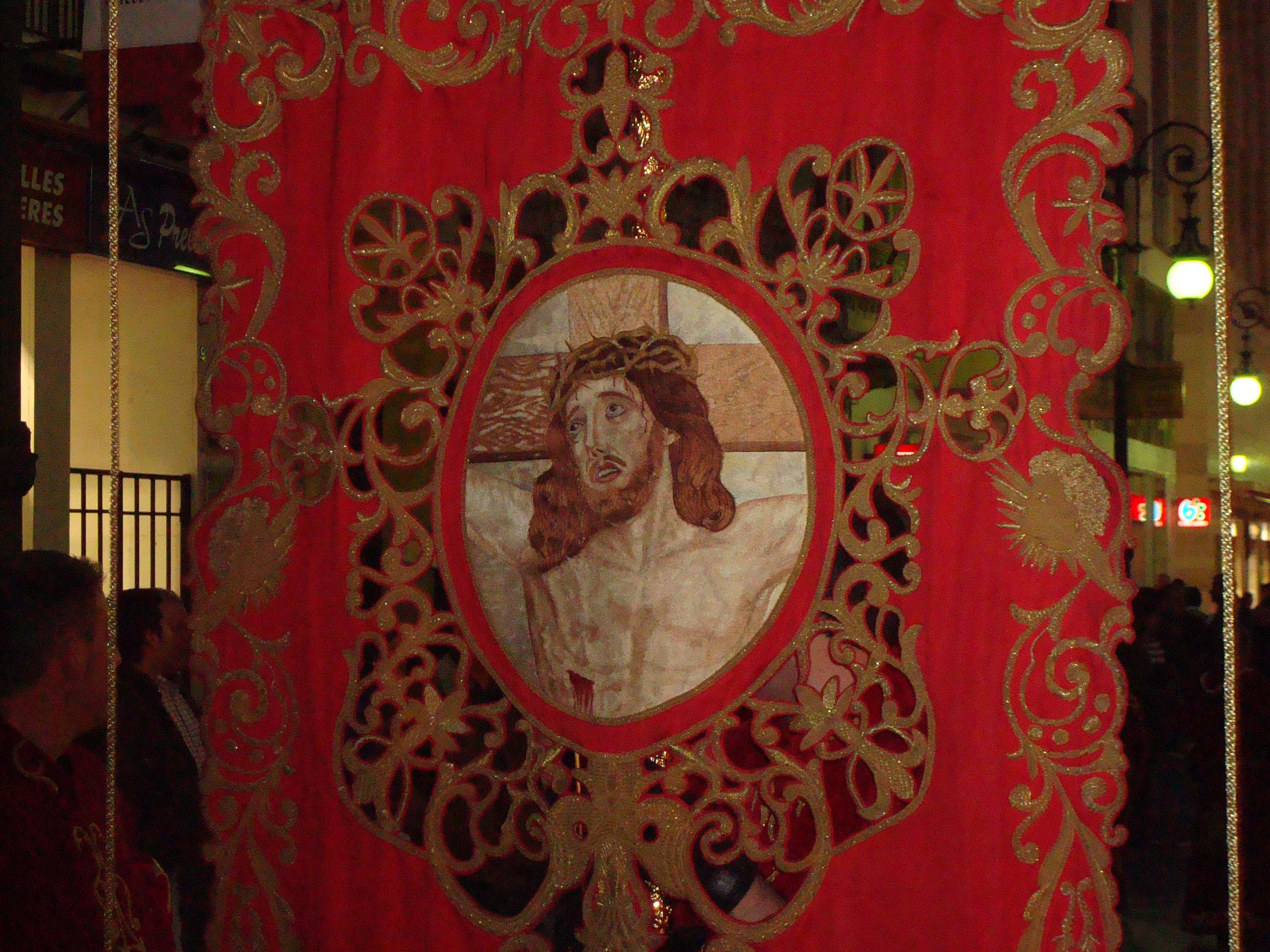 Estandarte titular del Paso Encarnado, Semana Santa de Lorca